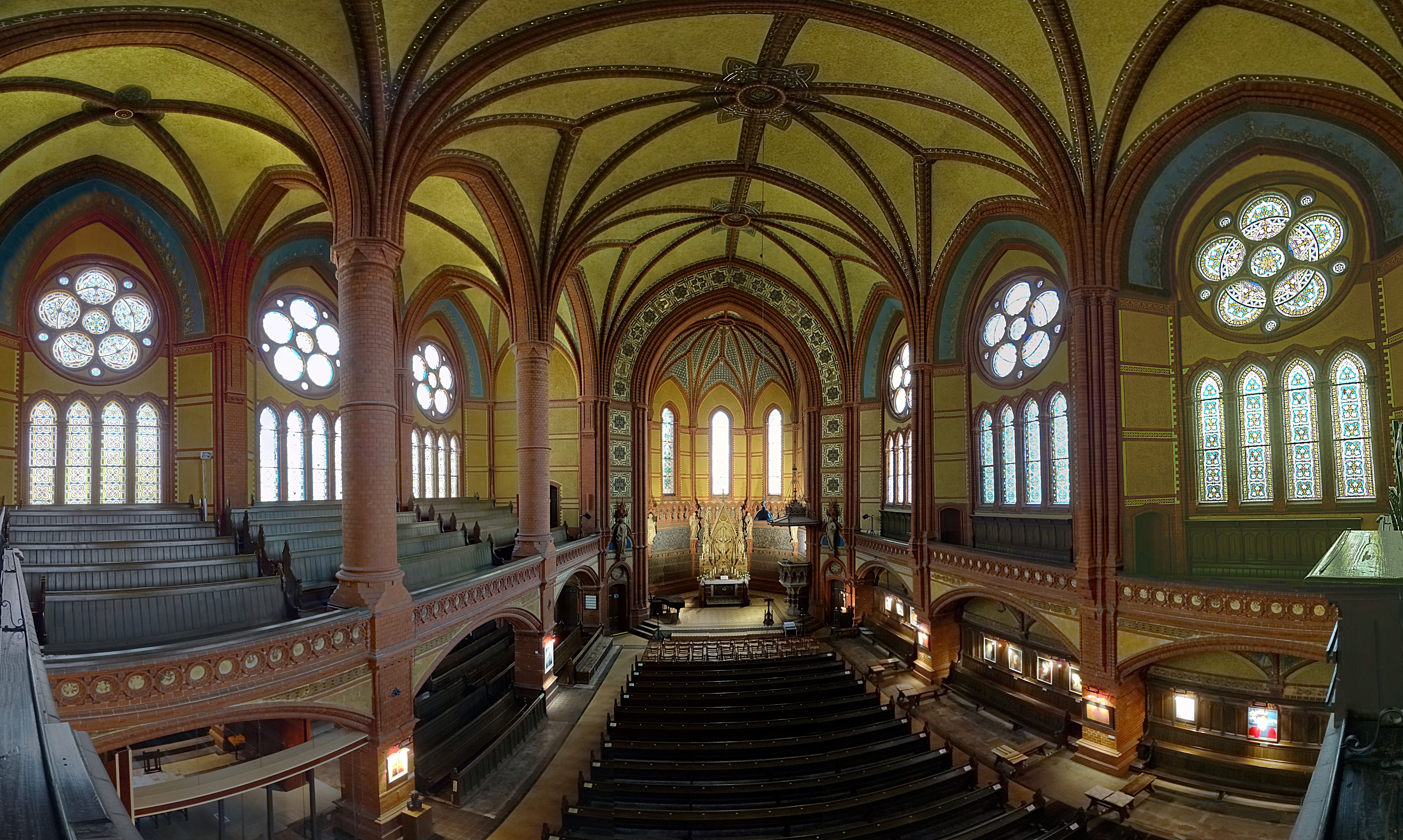 Lutherkirche Apolda Innenraumpanorama